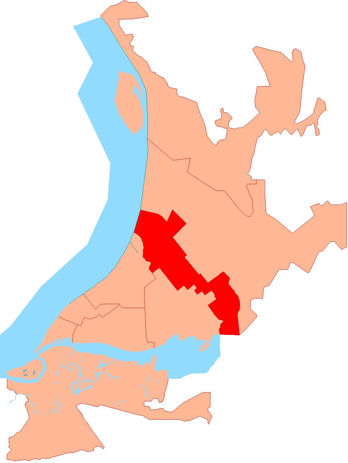 Samara district